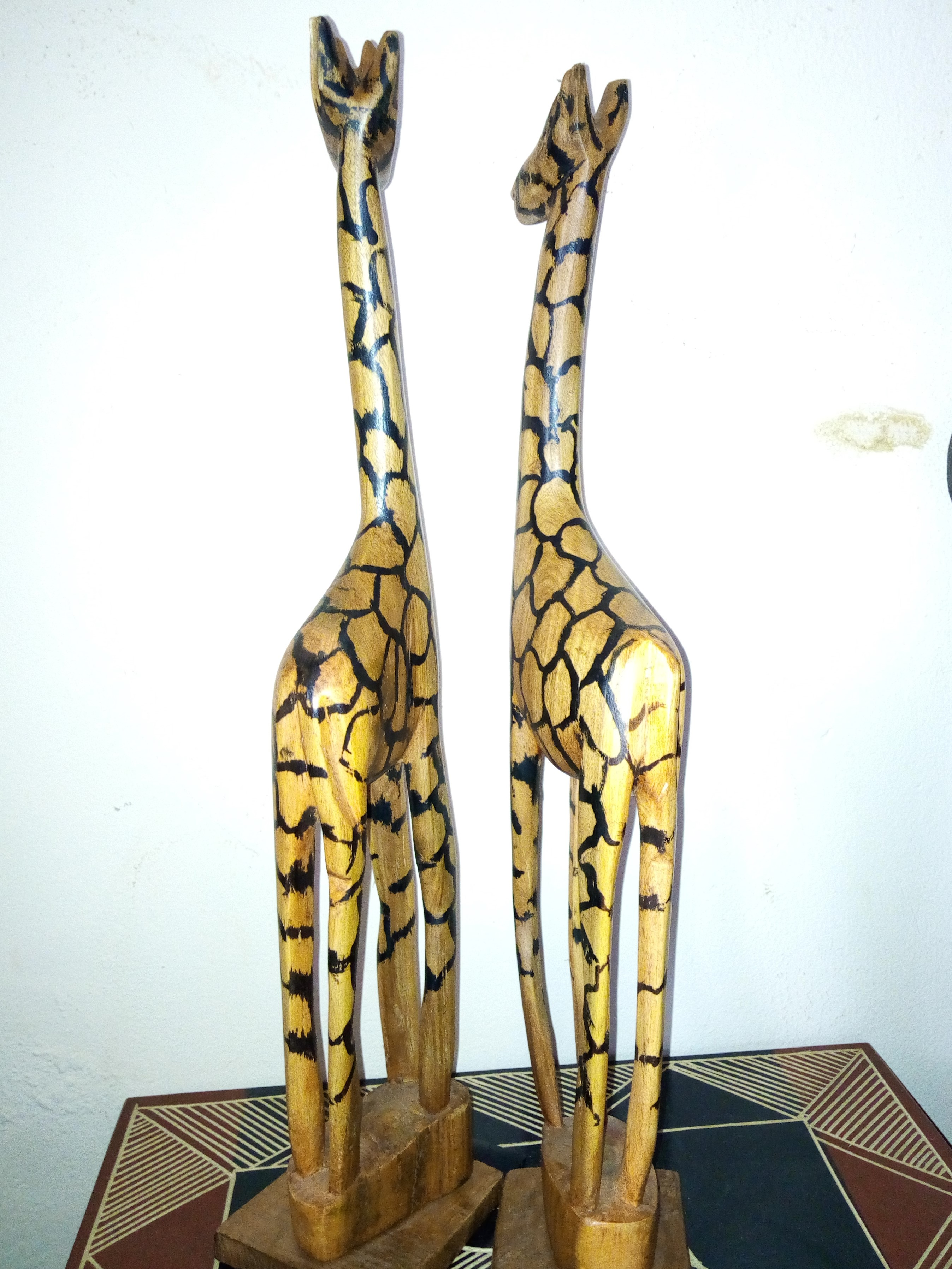 Statuettes sculpture de deux girafes sur un guéridon à titre décoratif. Cette statue est réalisée avec du bois pour décorer une maison Vue de dos